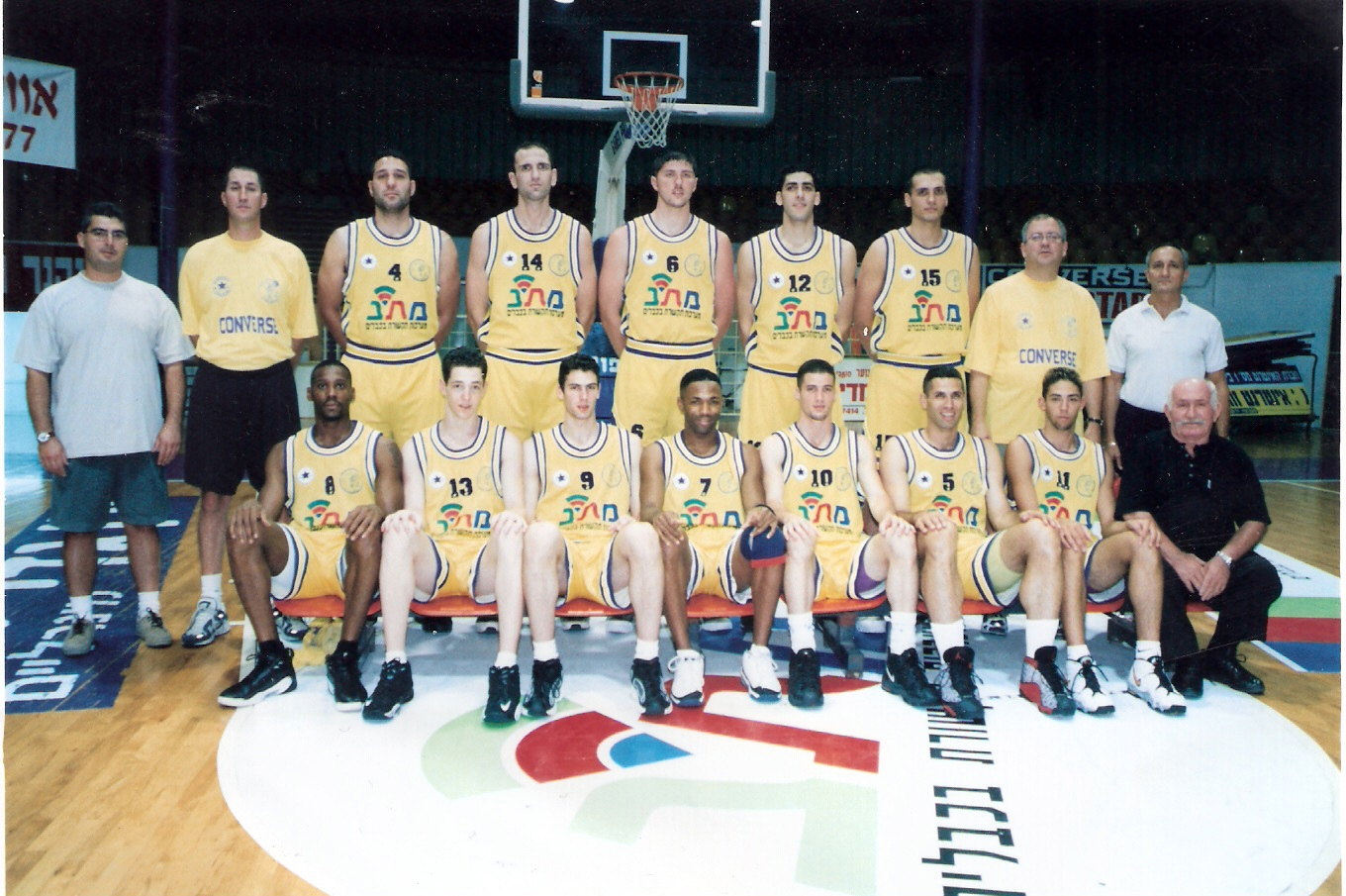 הפועל חולון 1999/2000: עומדים (מימין לשמאל)- ישראל לב (מאמן), עופר נעים, משה מזרחי, דושאן בוצ'בסקי, עופר פליישר, אלי בלול, רועי שידלצקי (ע.מאמן) יושבים (מימין לשמאל)- רפי פלוצקי, מוטי דניאל, עמית בן דוד, ג'ורג' גילמור, איתי לב, אור בן גורן, טיירון מייז.